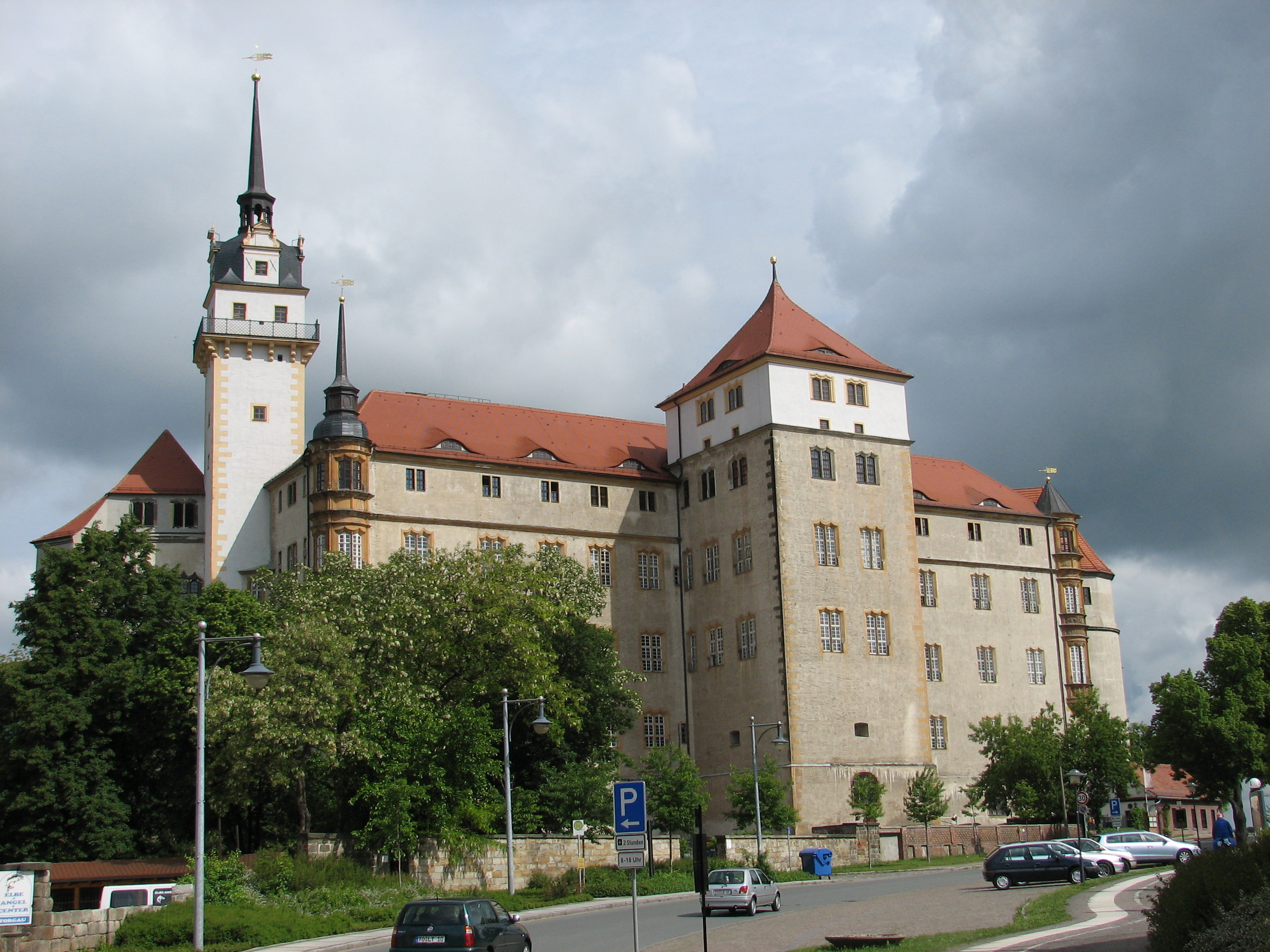 Schloss Hartenfels in Torgau